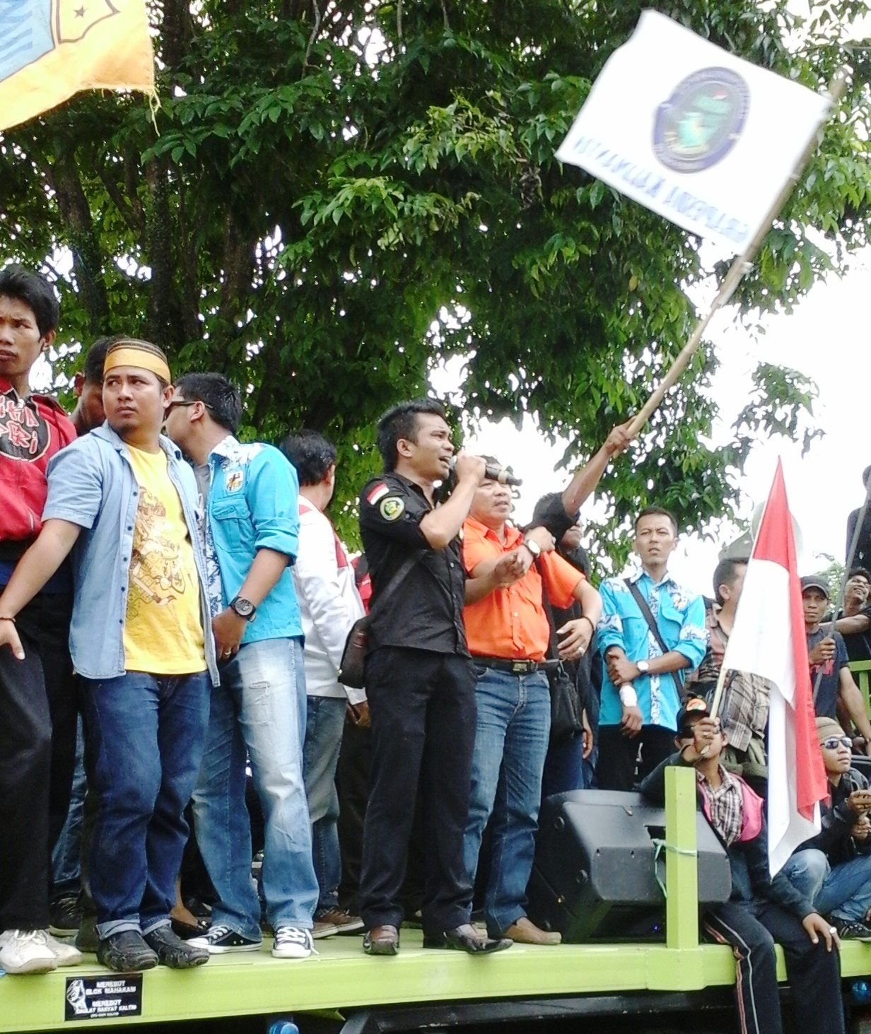 Orasi Perjuangan Blok Mahakam Desember 2014